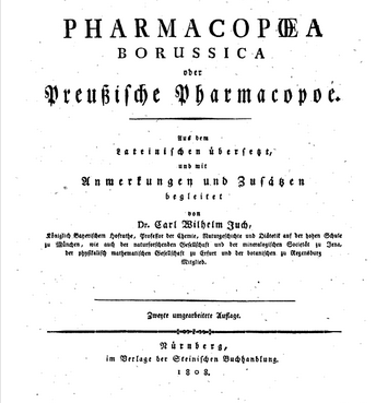 Pharmacopoea borussica: oder Preussische Pharmakopoe, 1808, Carl Wilhelm Juch (1772-1821)